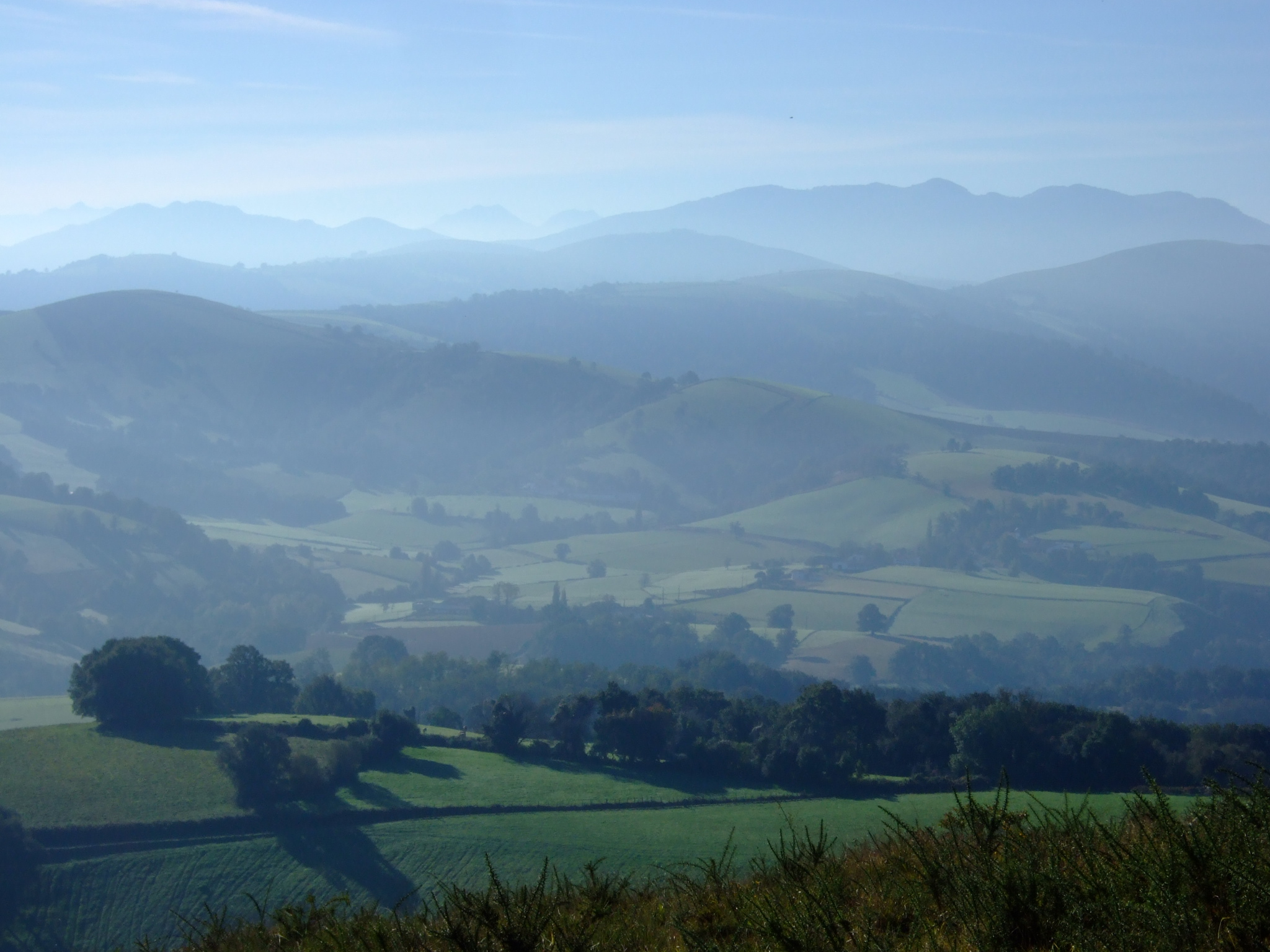 Sur le chemin de Saint-Jacques à Uhart-Mixe